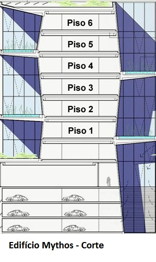 Mythos